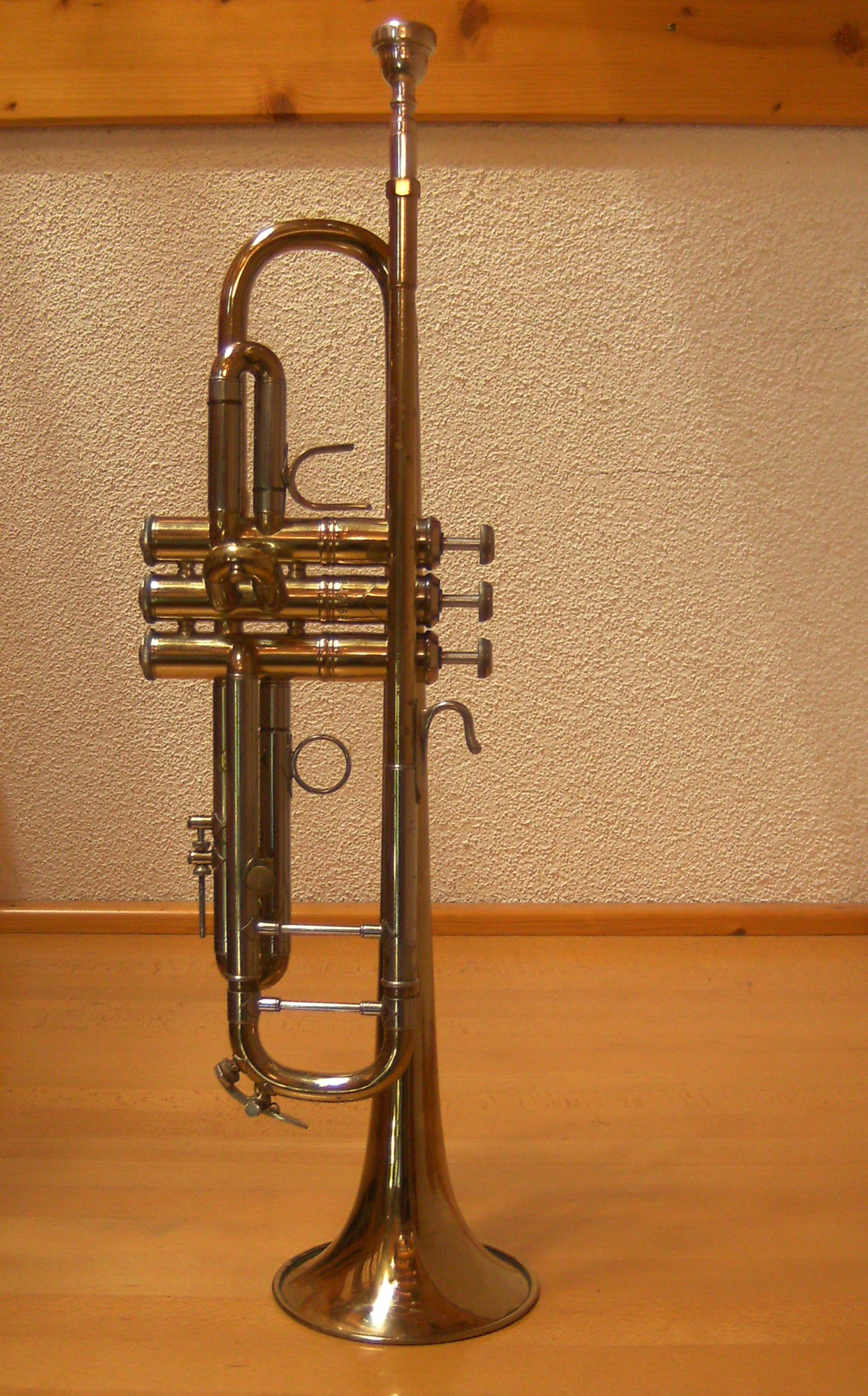 Trompete der Firma Bach